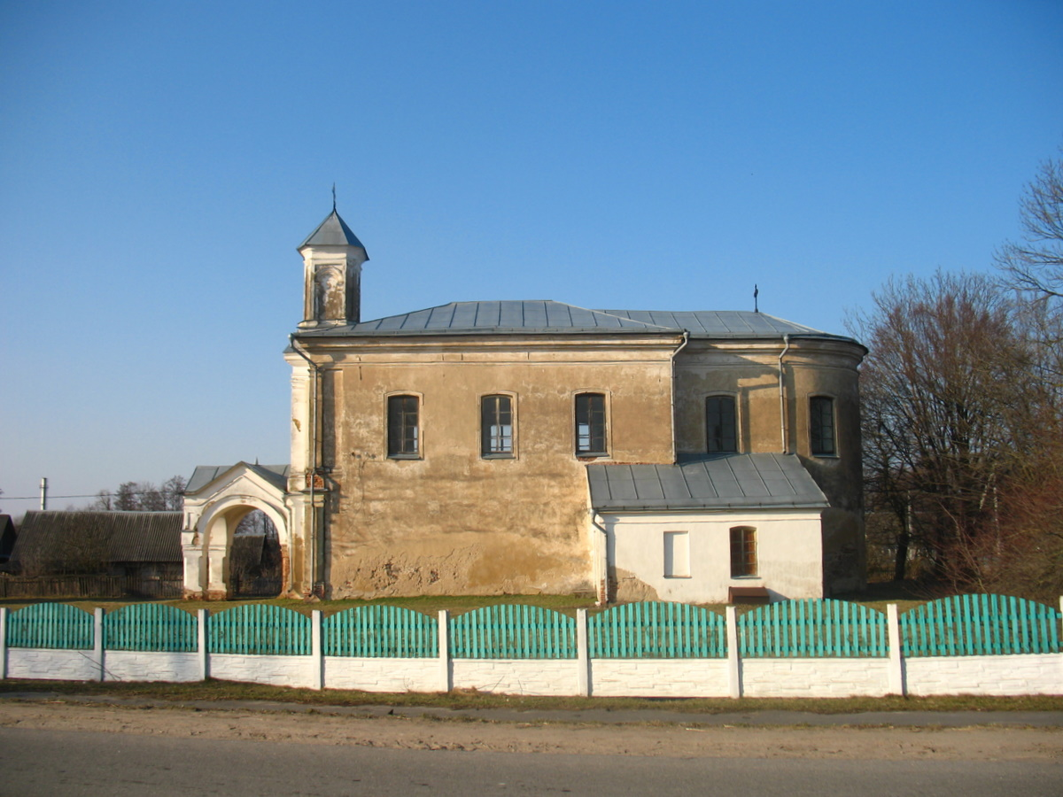 Беларуская (тарашкевіца): Новадзявяткавічы